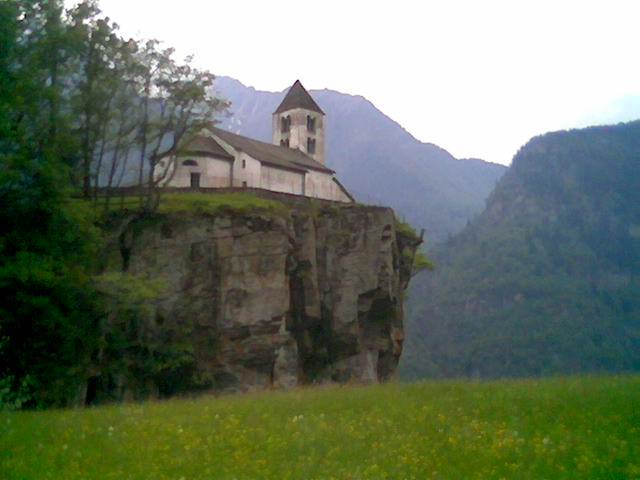 Pfarrkirche von San Martino in Calonico TI (Tessin, Schweiz)